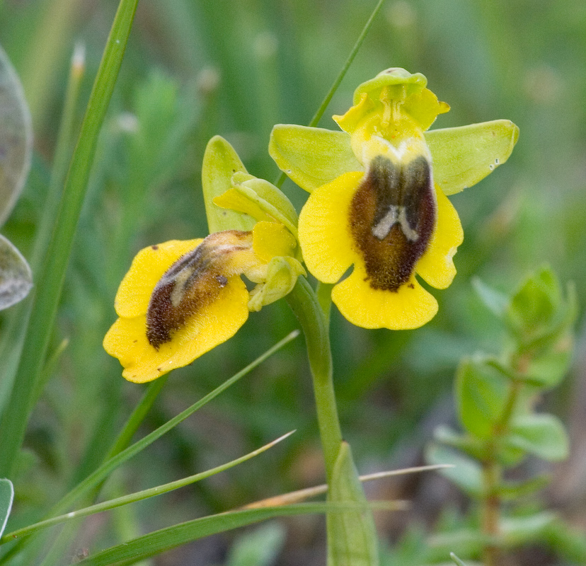 Riserva naturale dello Zingaro Ophrys lutea